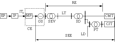 EP-energie primară; IP-instalaţie primară; ITr-instalaţie de transport; MP-maşină primară; GS-generator sincron; CE-centrală electrică; SEV-staţie de evacuare; LT-linie de transport; SD-staţie de distribuţie; LD-linie de distribuţie; PT-post de transformare; CMT-consumator de medie tensiune; CMJ- consumator de joasă tensiune.